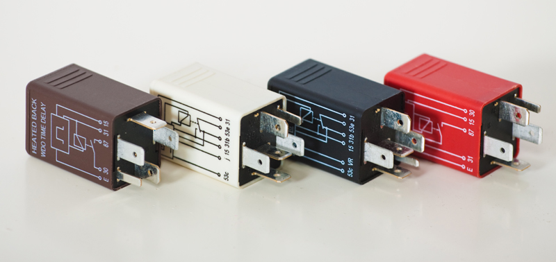 Реле